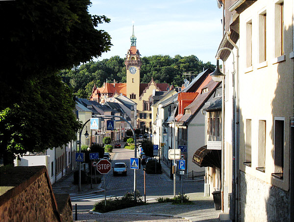 Waldheim - Blick auf den Obermarkt